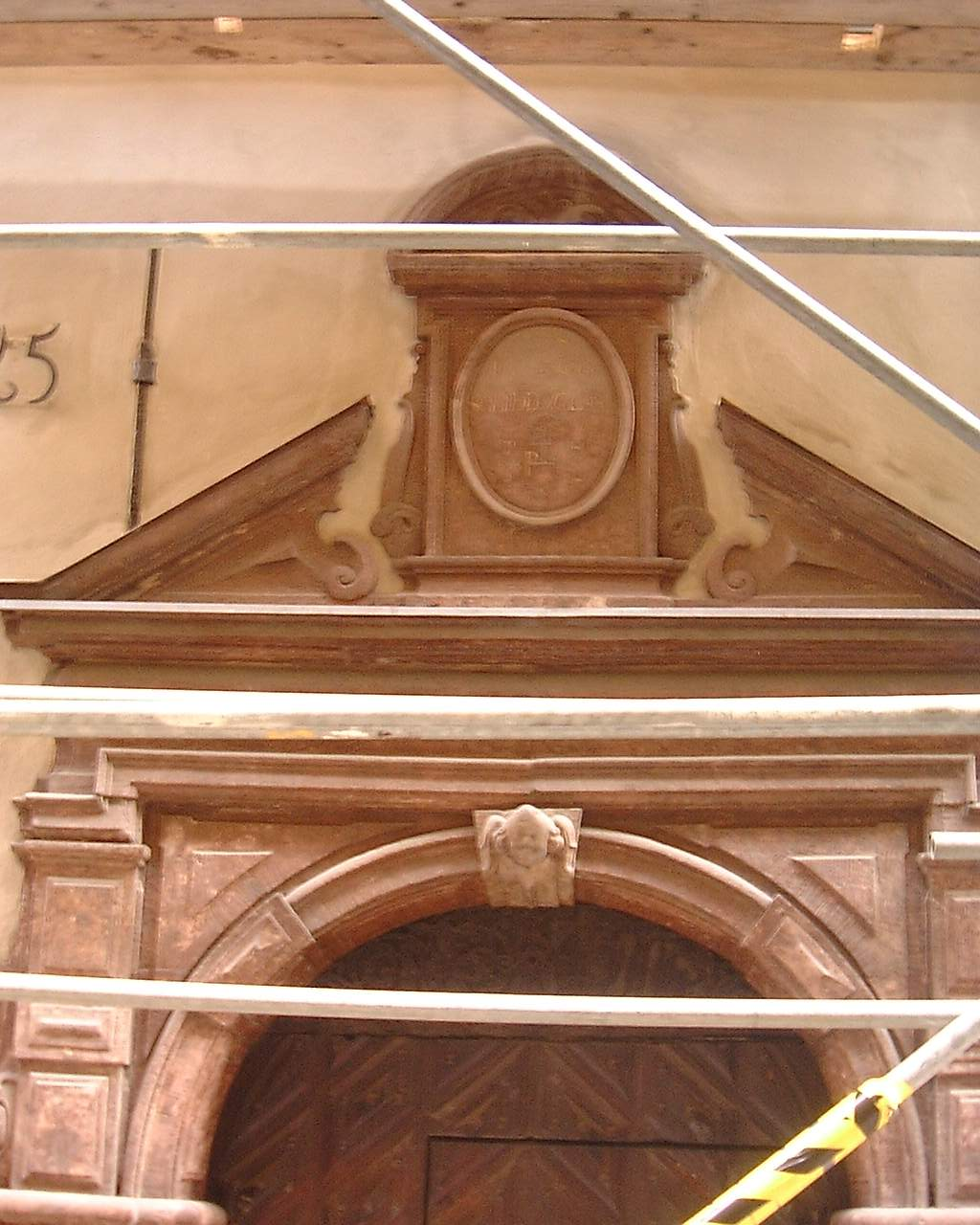 Detail of portal at 65, Västerlånggatan. Gamla stan, Stockholm.